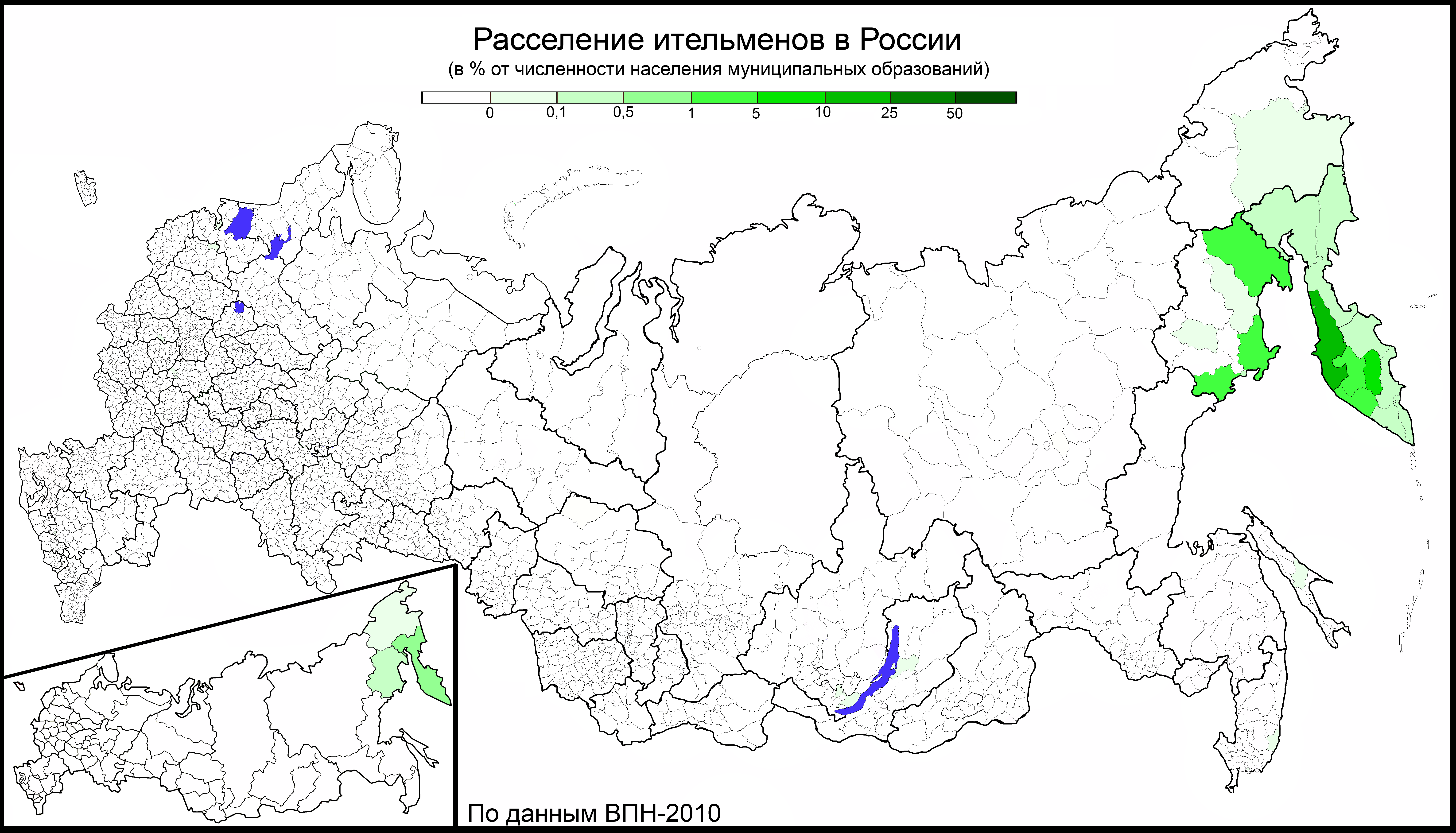 Расселение ительменов в России по муниципальным районам и городским округам в % от численности населения соответствующих муниципальных образований. По переписи 2010 года